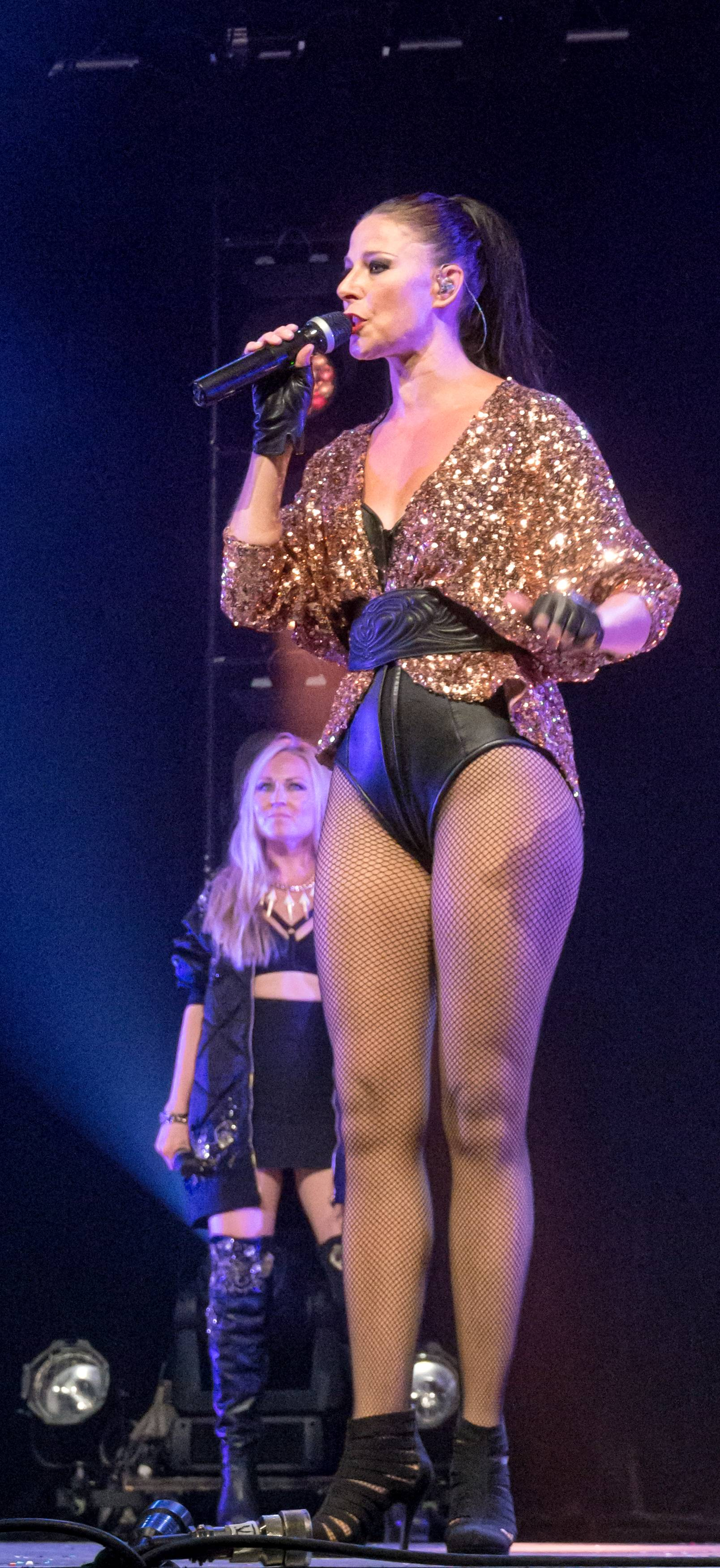 Bilder vom ZMF 2015, die Gala FORK am 15. Juli 2015